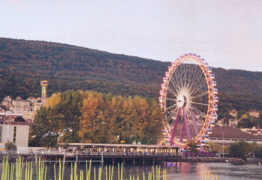 Expo.02-Ausstellungsgelände in NE, von der Arteplage aus aufgenommen